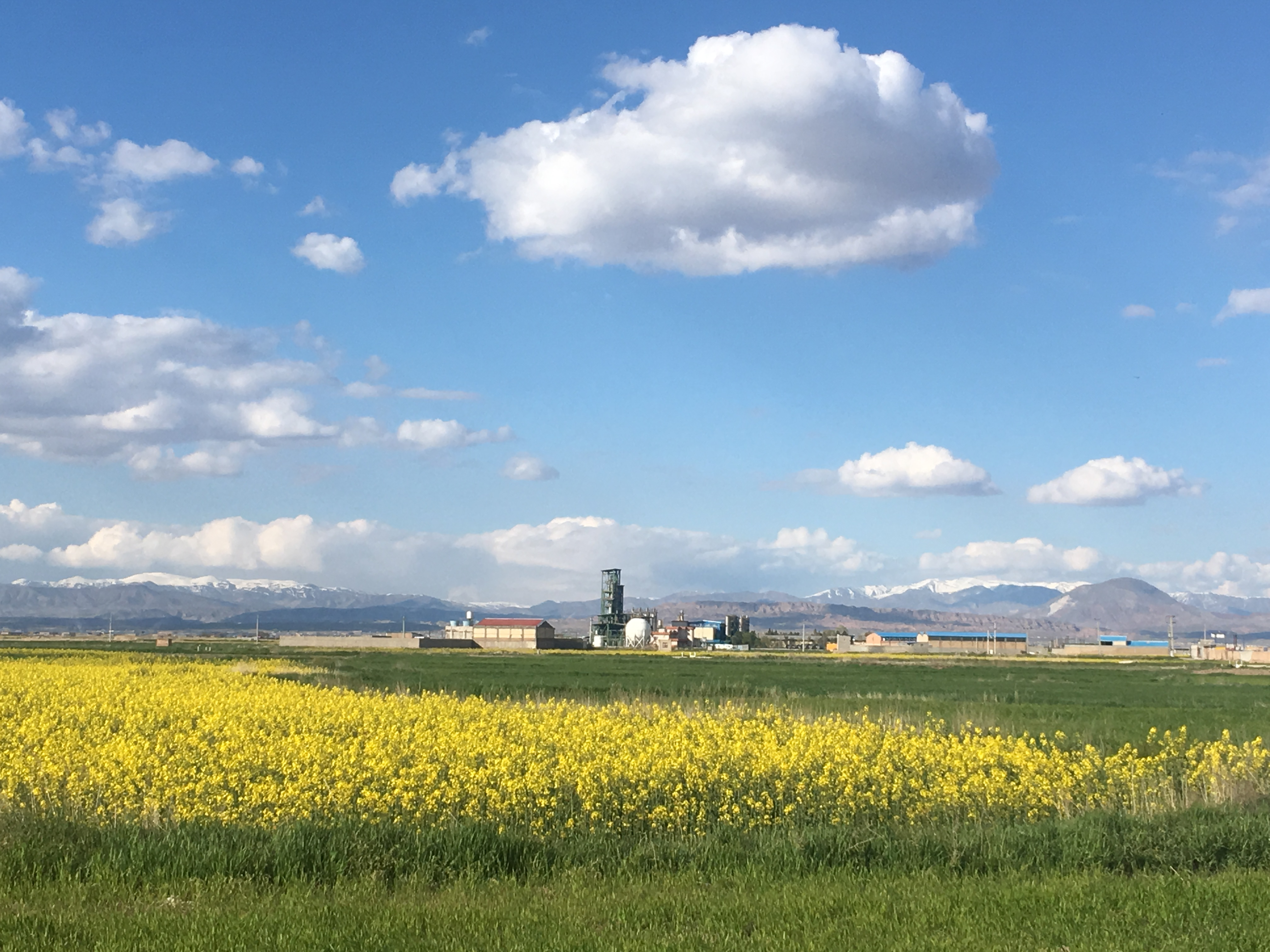 شرکت پلی نار آلایندۀ محیط زیست منطقۀ غرب تبریز